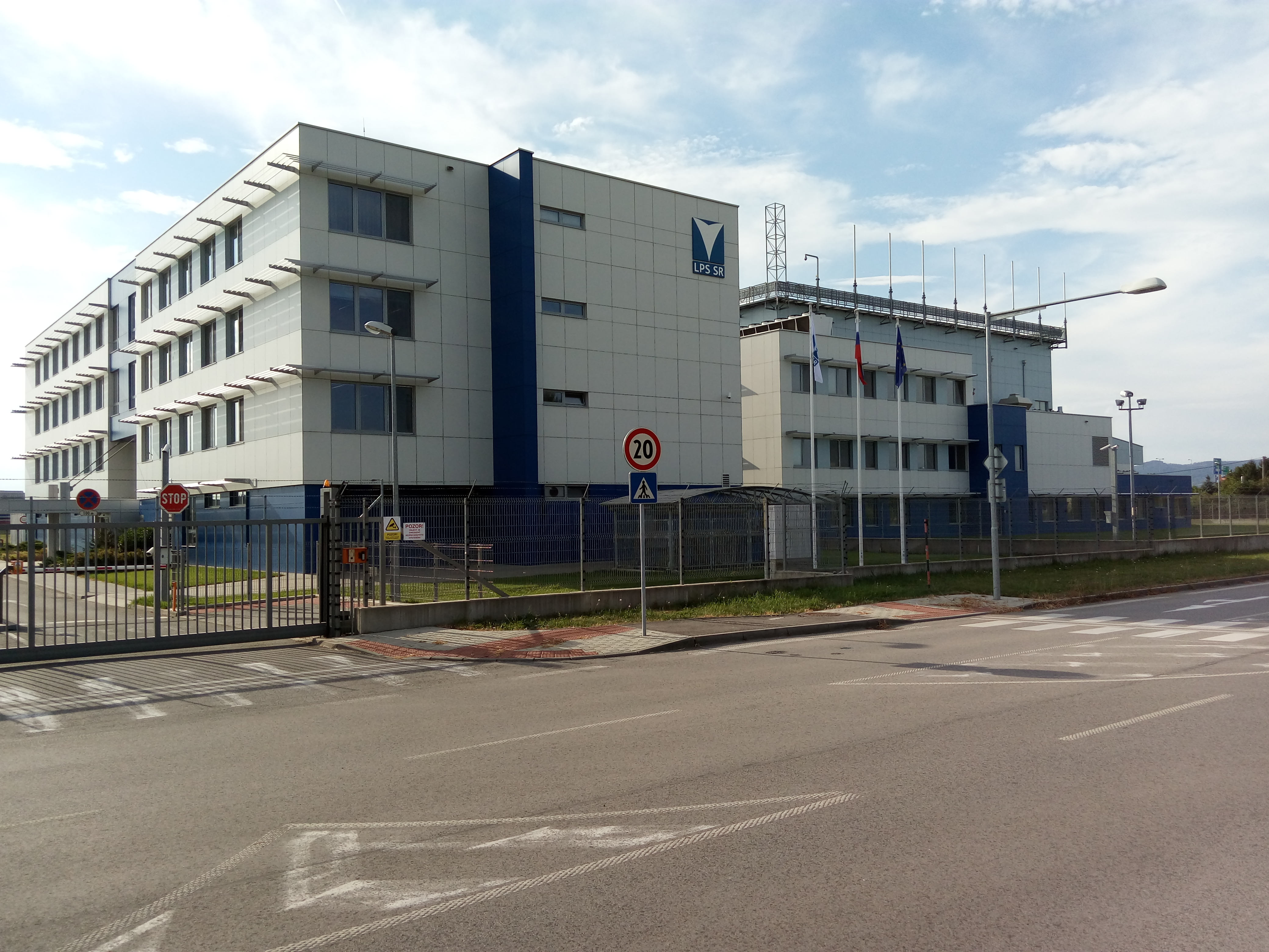 Ivanská cesta, Ružinov, Bratislava